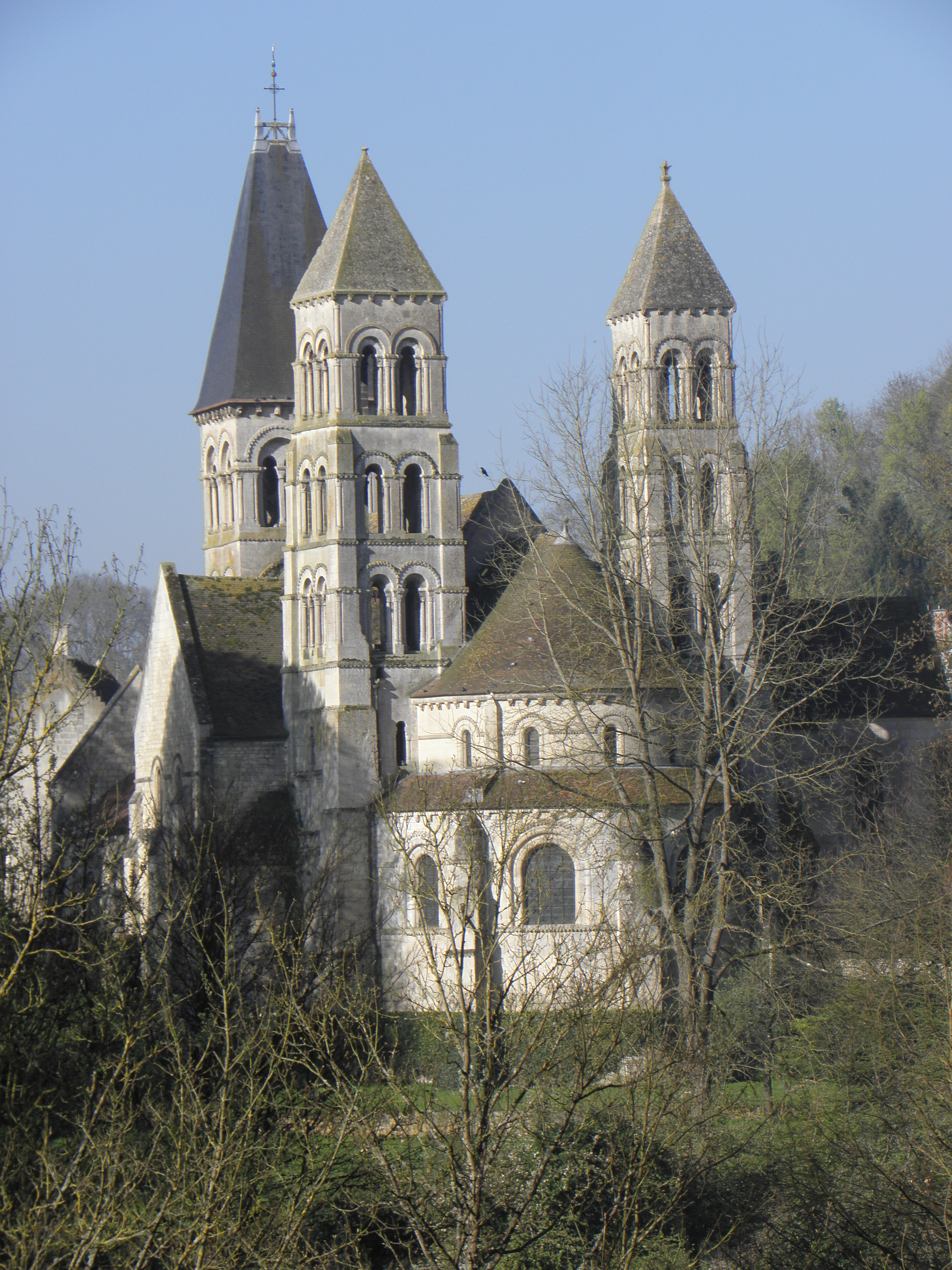 Chevet de l'abbatiale Notre-Dame de Morienval (60).